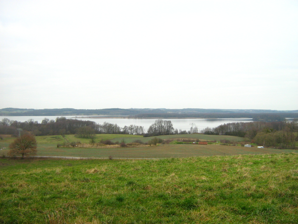 Die Lieps vom südlichen Dorfrand von Usadel aus gesehen. Der See gehört zum Territorium der kreisfreien Stadt Neubrandenburg, das umliegende Land jedoch zu den Landkreisen Mecklenburg-Strelitz (im Vordergrund) und Müritz (im Bildhintergrund) (Mecklenburg-Vorpommern). - Google Maps - Google Earth